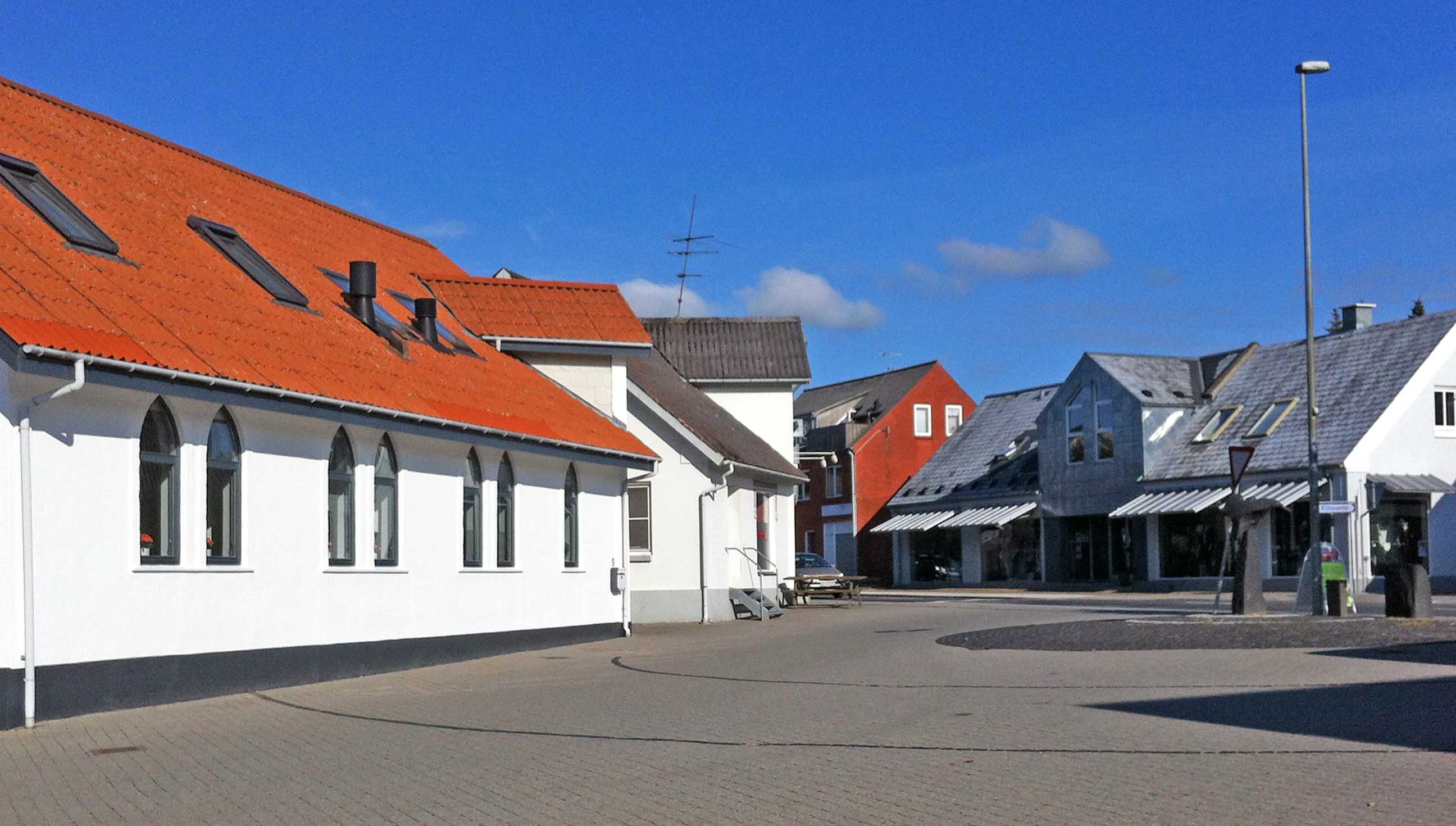 Nørager hvor Stationsvej munder ud i Bredgade